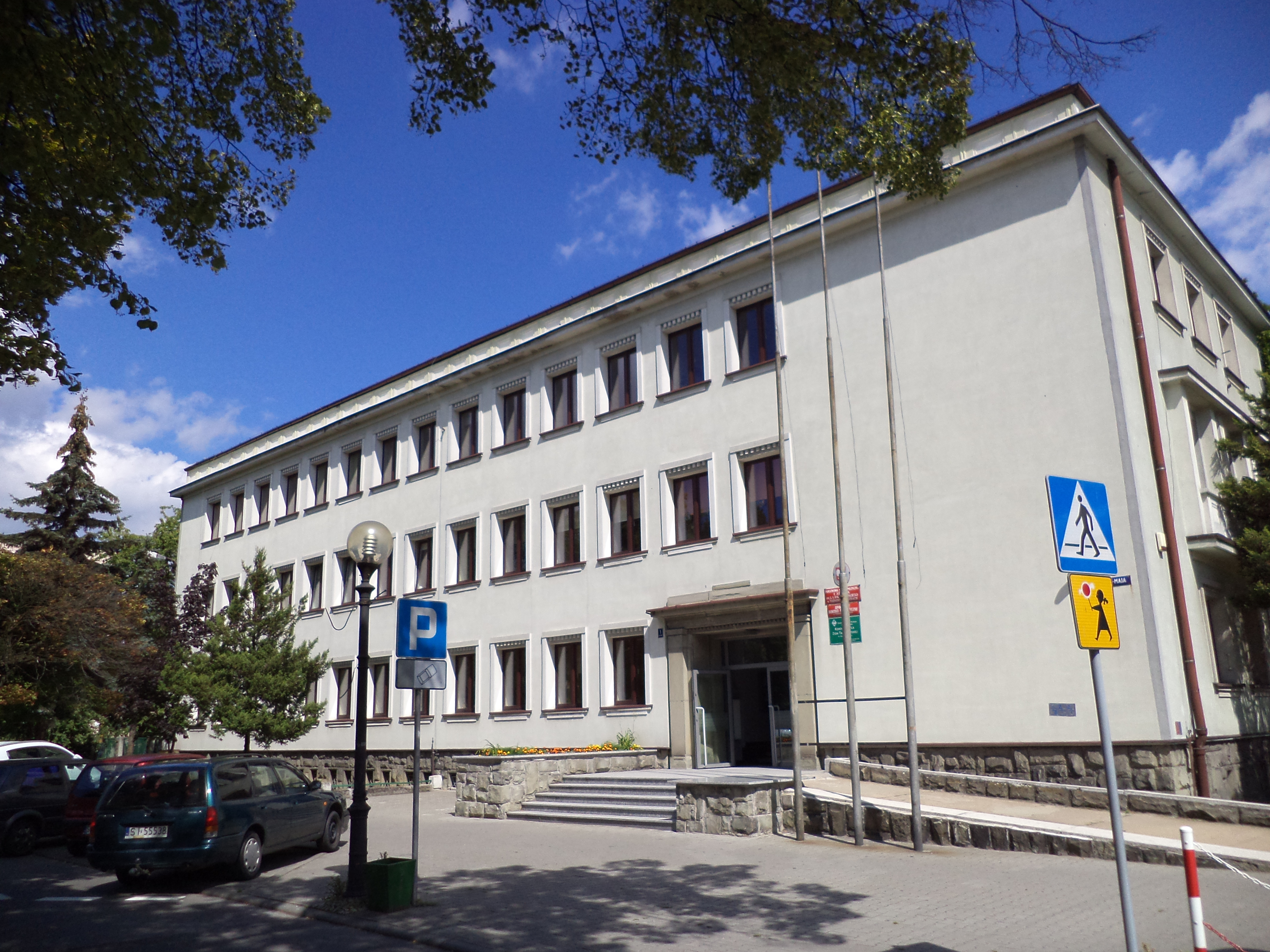 Państwowa Szkoła Muzyczna im.J.I.Paderewskiego w Tarnowskich Górach Tarnowskie Góry, 9 maja 1